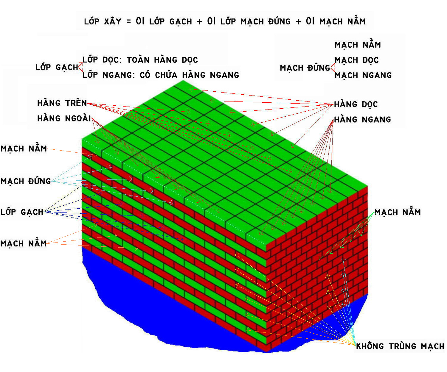 Hình tự tạo